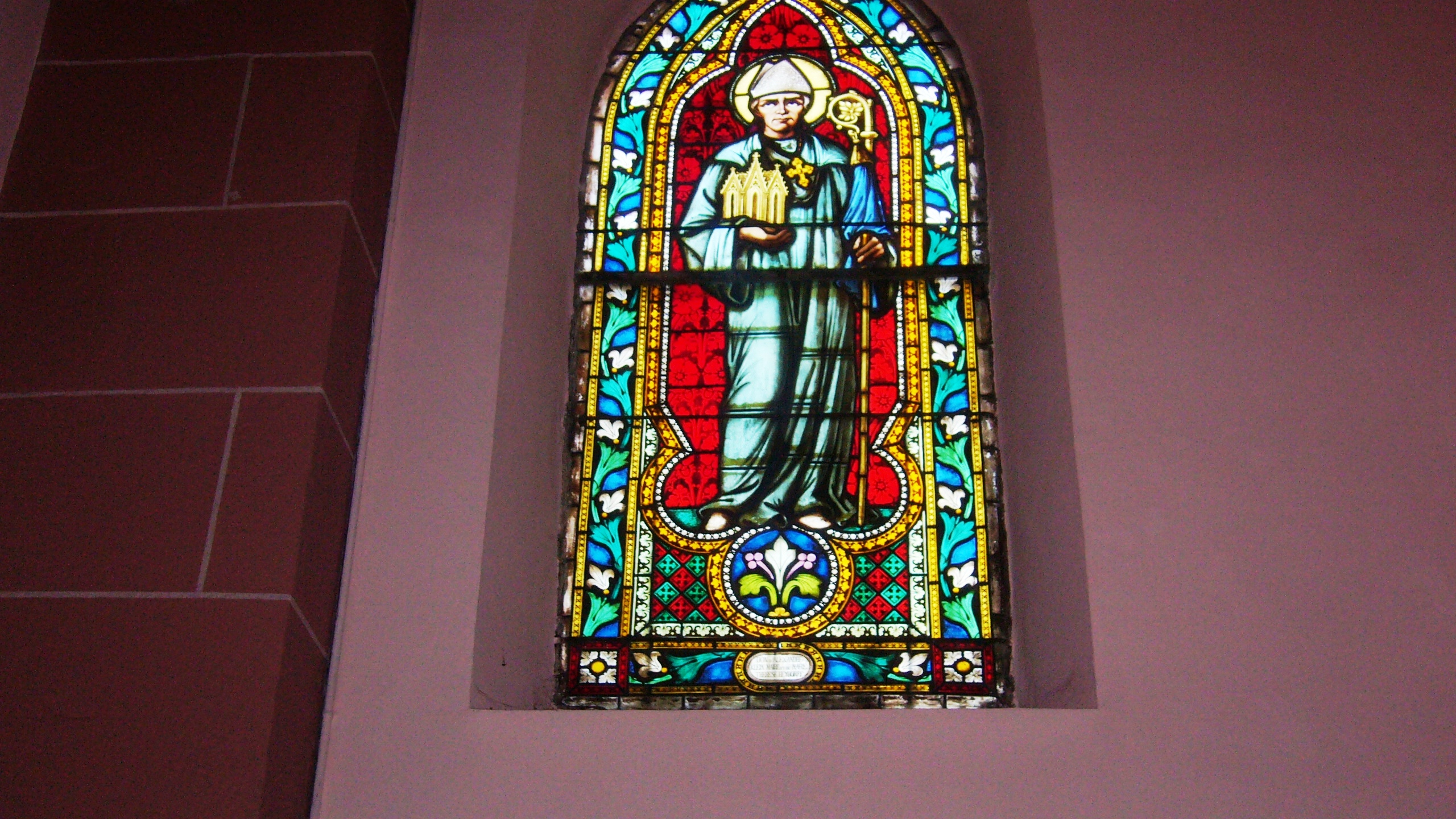 Saint-Fulrad, avec mître et crosse d'évêque représenté sur le vitrail de gauche dans l'église de Saint-Hippolyte.